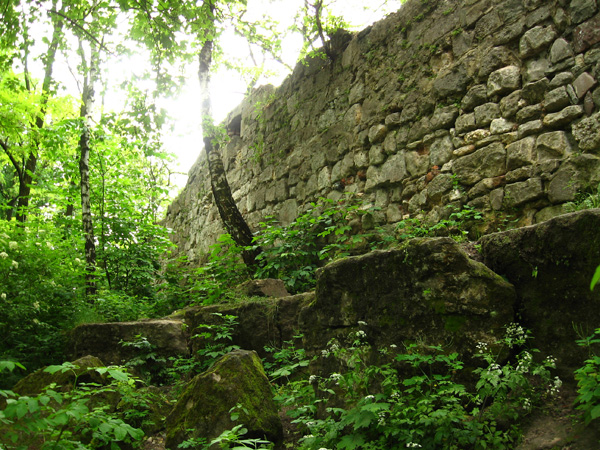 Остатки крепостной стены Высокого замка (польский период)